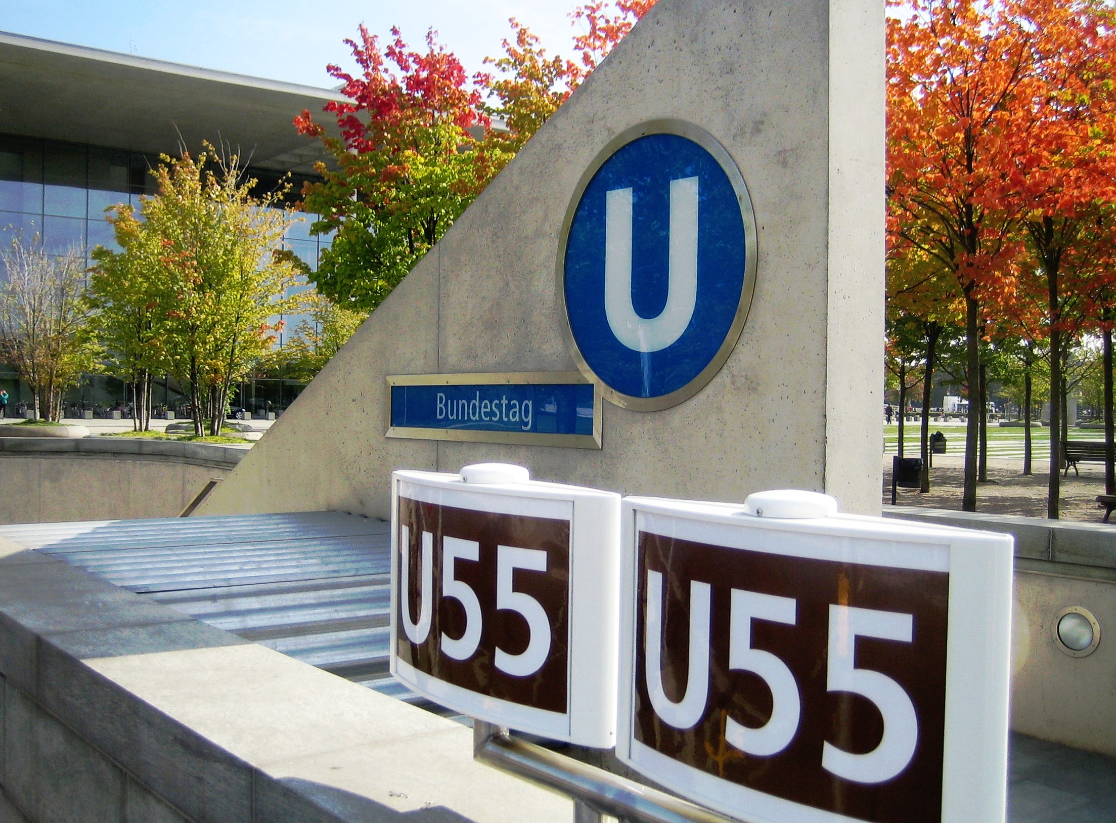 Beschriftung am Eingang der Station "Bundestag" der U-Bahnlinie U 55 in Berlin. Hinten links das Paul-Löbe-Haus.